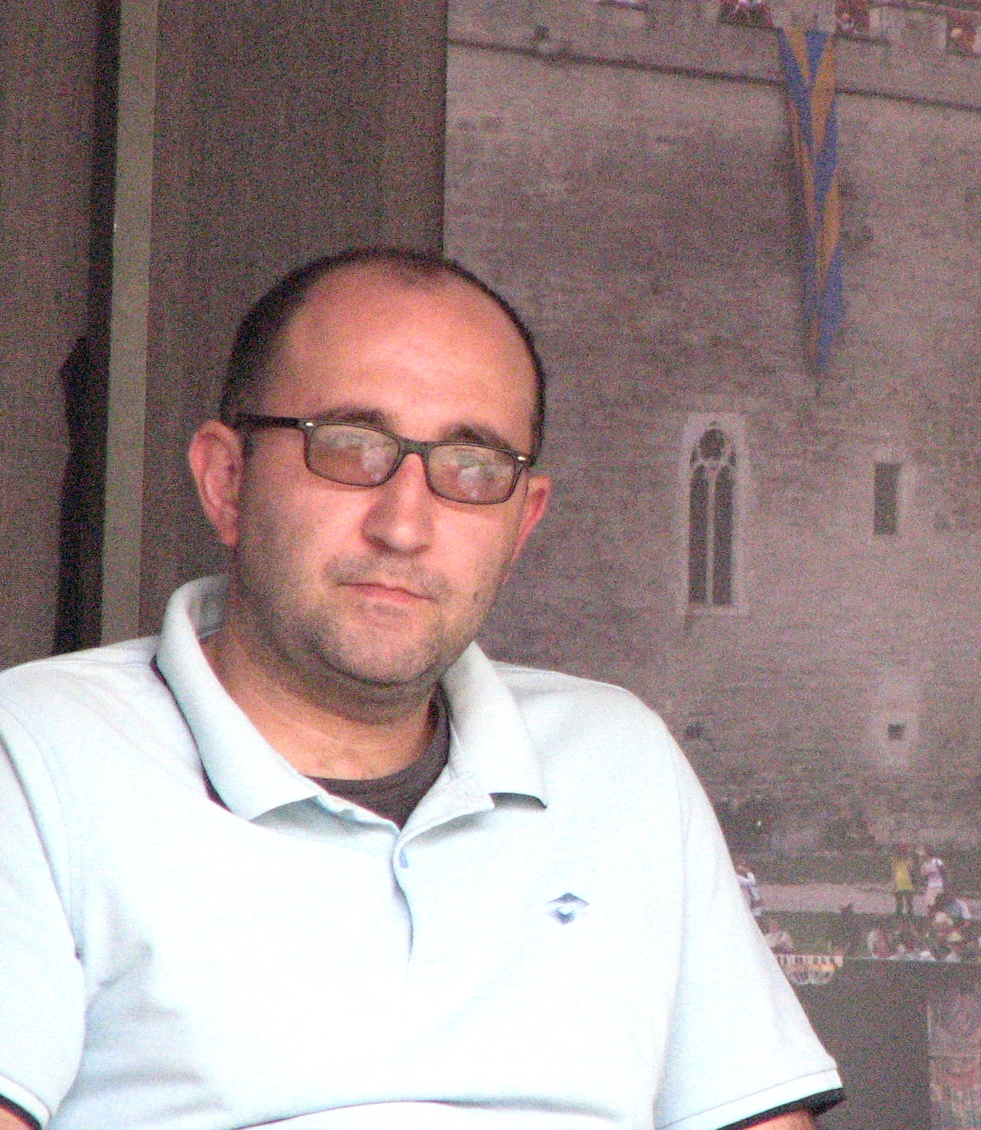 Revaz Javahišvili esinemas Kuressaare Arensburgi ooperikohvikus